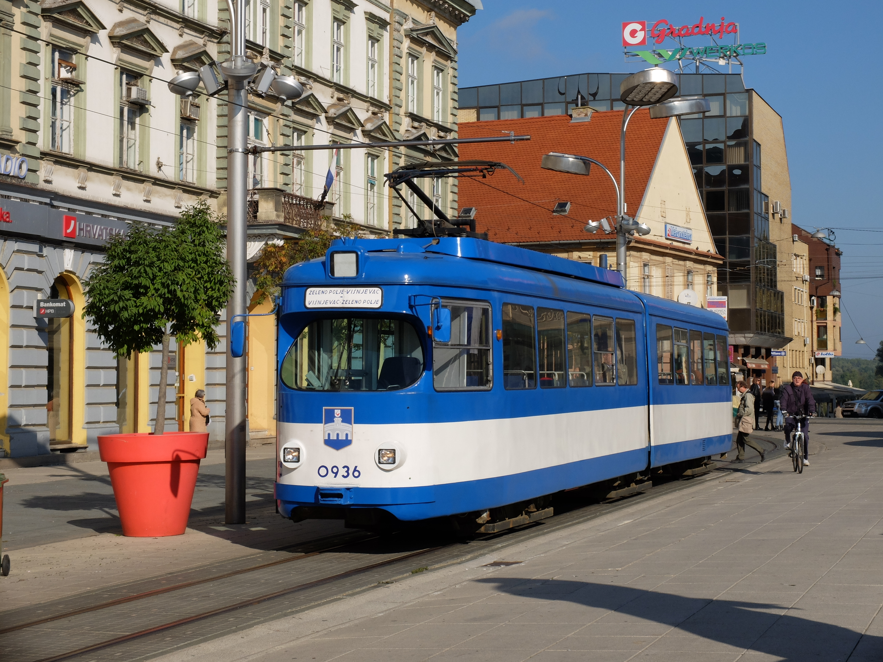 Straßenbahn Nr. 0926 (GT6) in Osijek